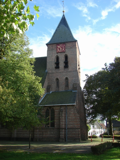 Torenpleinkerk in Vleuten